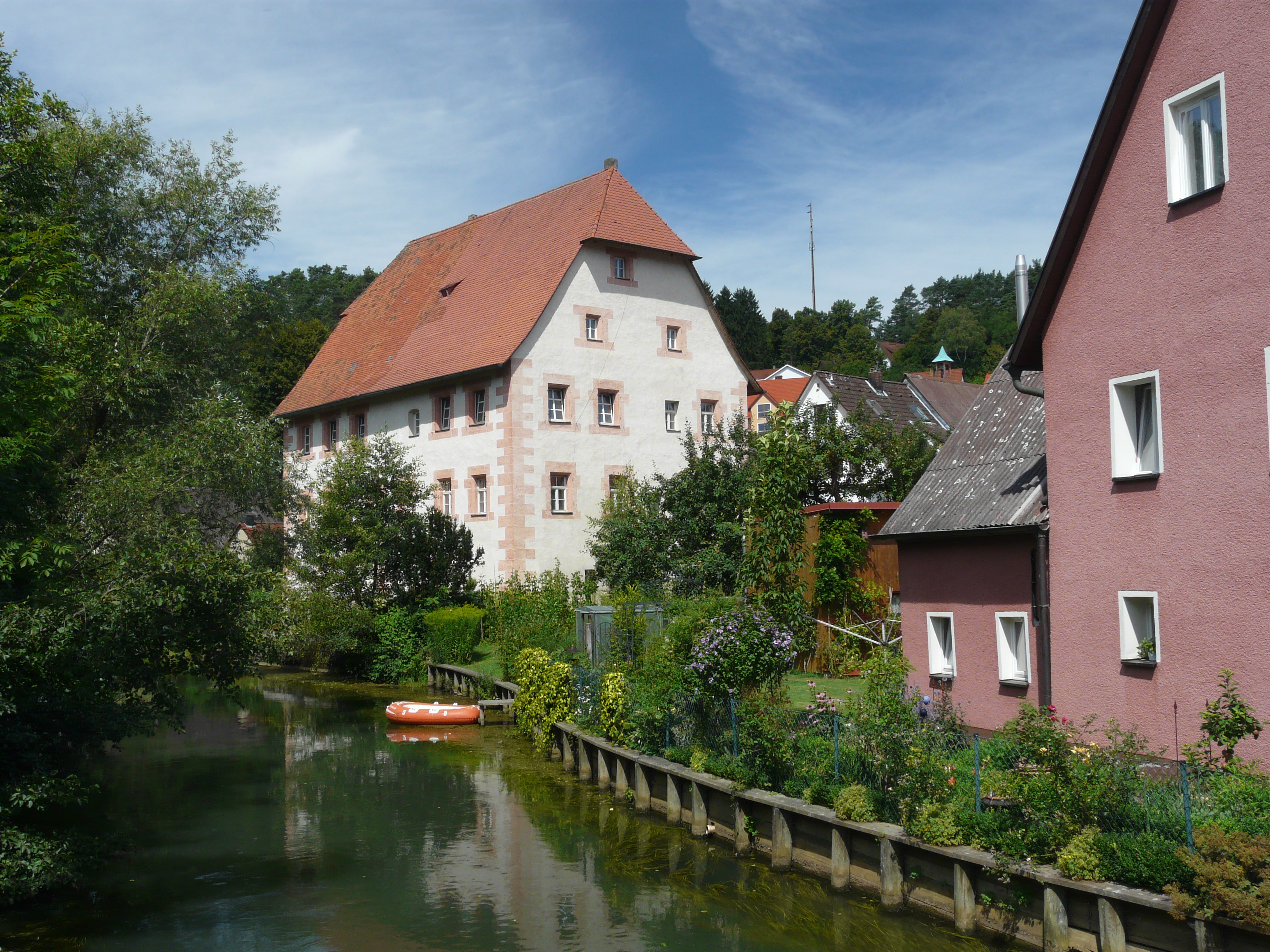 Das ehemalige Pflegerschloss von Velden im mittelfränkischen Landkreis Nürnberger Land